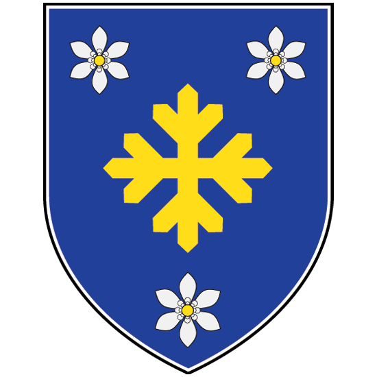 Grb Čajetine